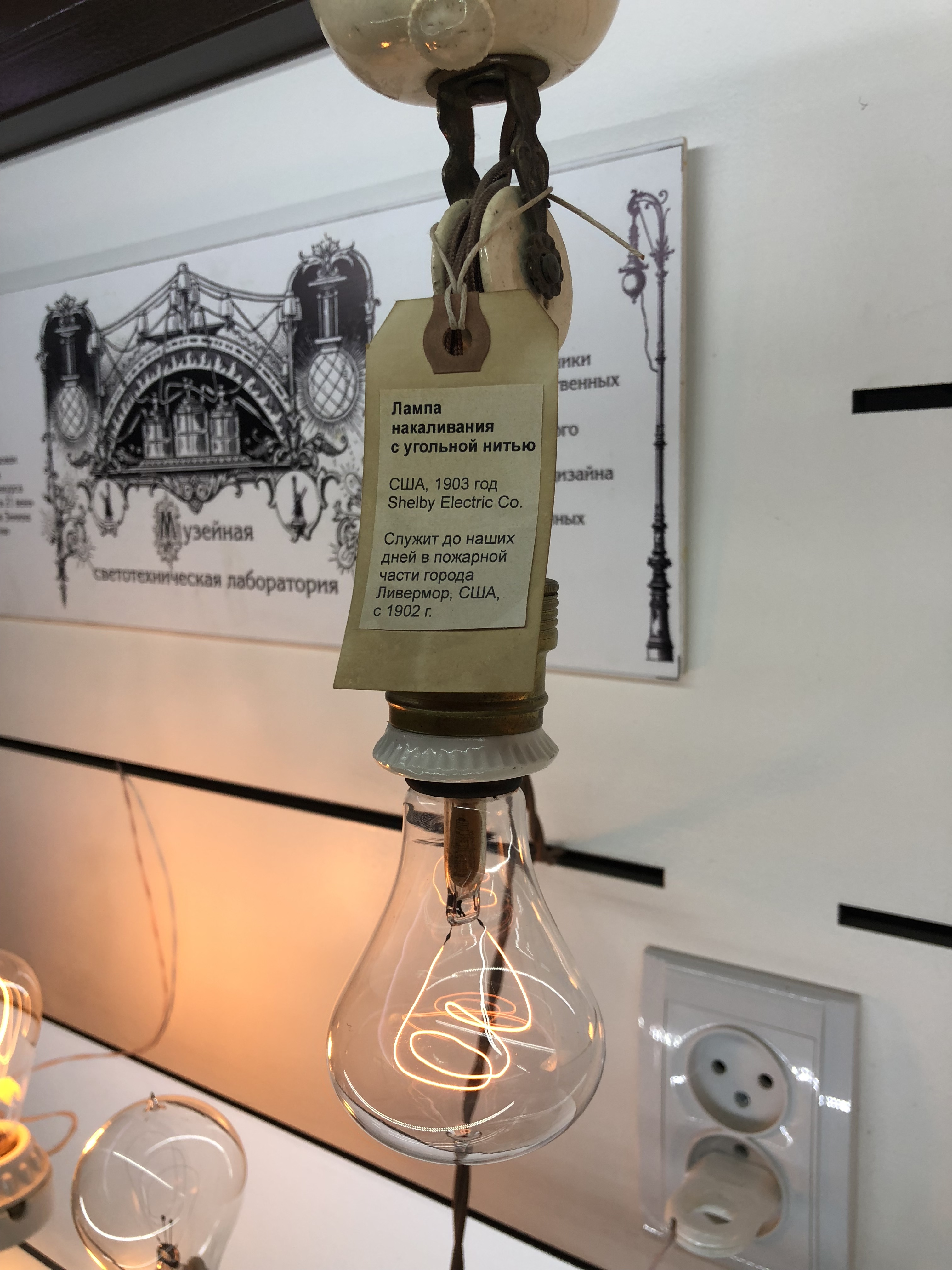 Лампочка Shelby Electric Inc. выставлена в постоянной экспозиции 4-го залм музея "Огни Москвы" точно такая же как и в пожарном депо г. Ливермор США - та же модель и год выпуска. Лампочка в рабочем состоянии.